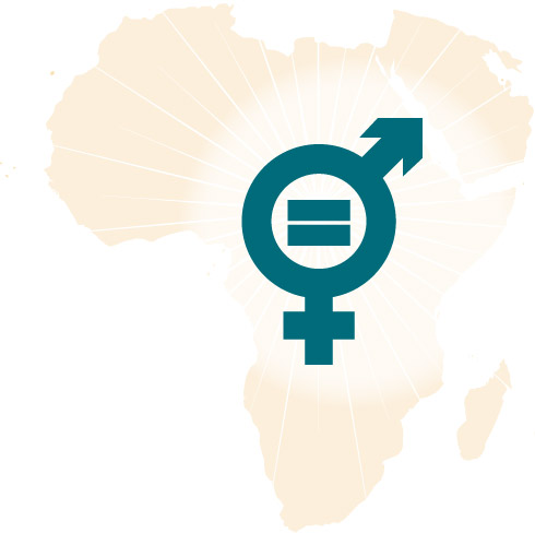 Fra nettstedet som presenterer prosjeketet «Women in African History»